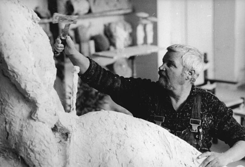 ADN-ZB-Sindermann-7.11.1985-Bez. Rostock: Bildhauer Prof. Jo Jastram, Ordentliches Mitglied der Akademie der Künste der DDR.